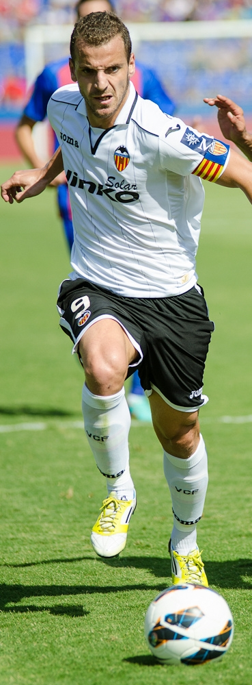 Soldado amb el baló en un Llevant - València.